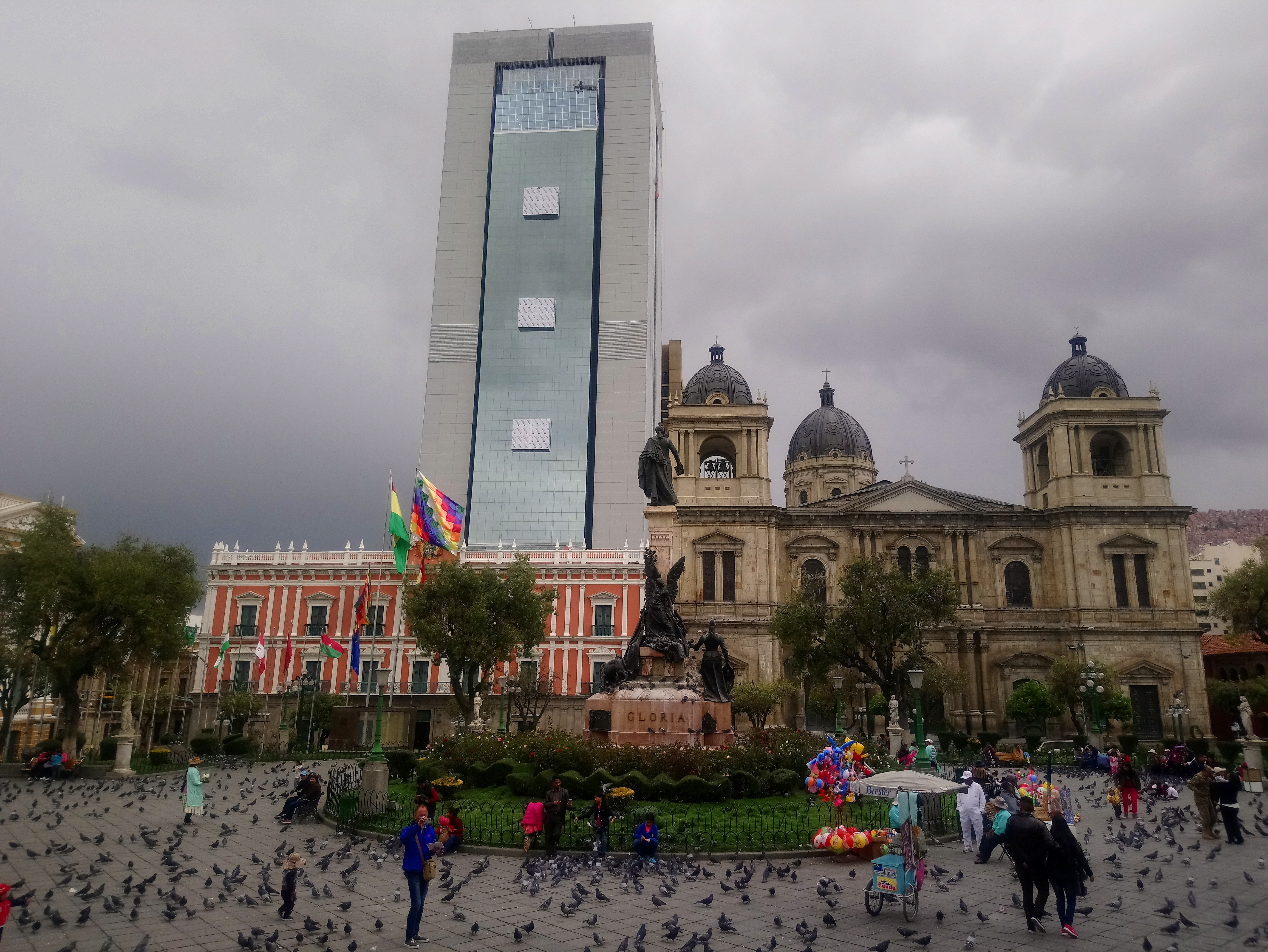 Plaza Murillo, palacio de gobierno y catedral en mayo de 2018